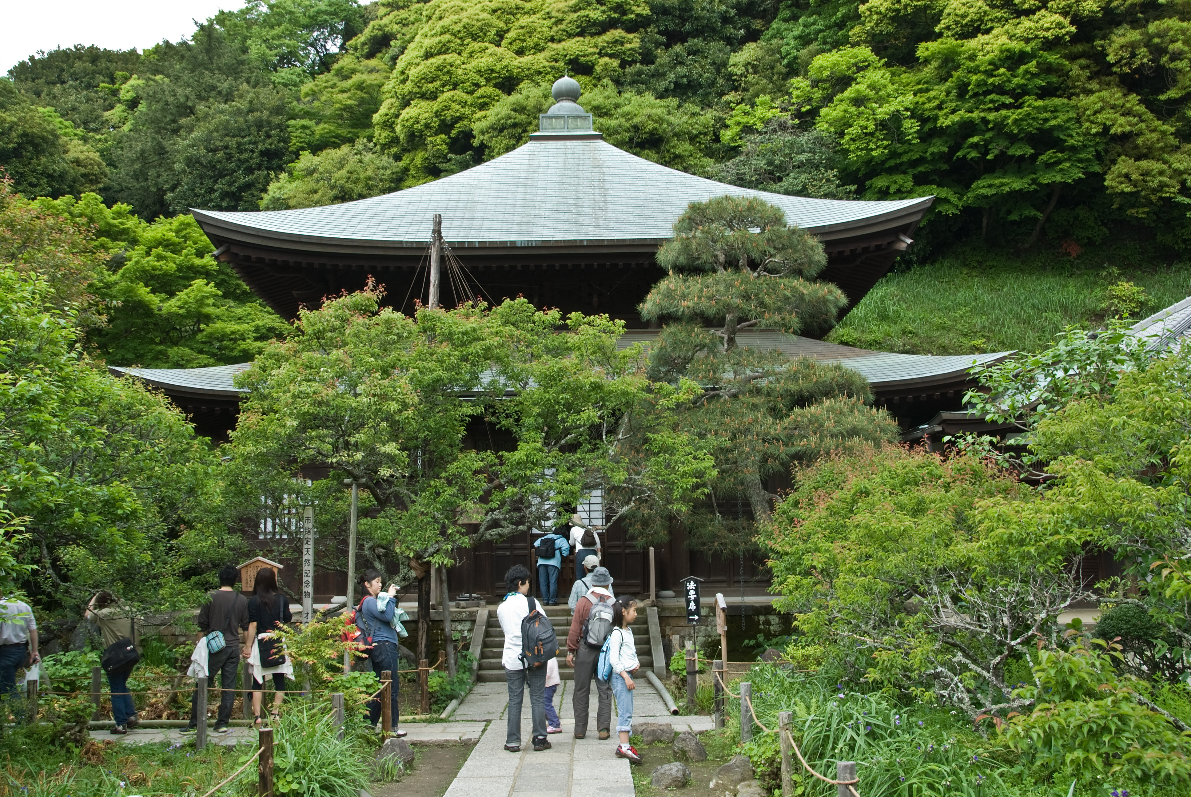 Main Hall, Zuisen-ji, Kamakura